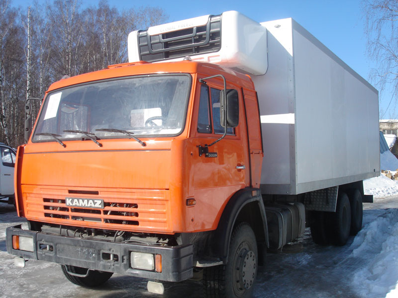 Рефрижератор на базе Камаза российского производства